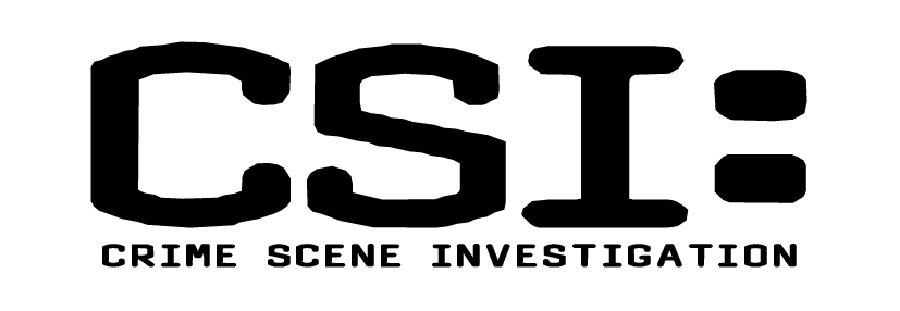 Fuente tipográfica "CSI" con escrito CSI.